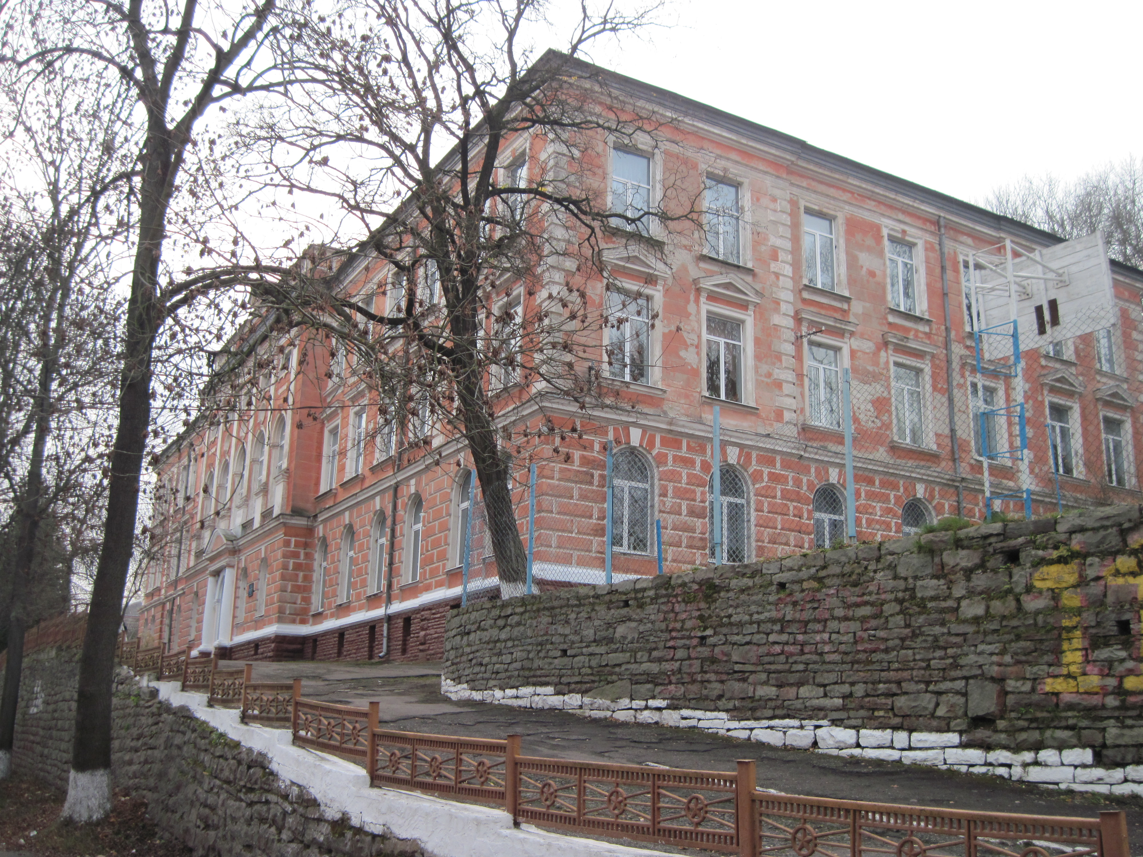 Ґімназія імени Володимира Гнатюка. Бучач, Тернопільська область, осінь 2013.